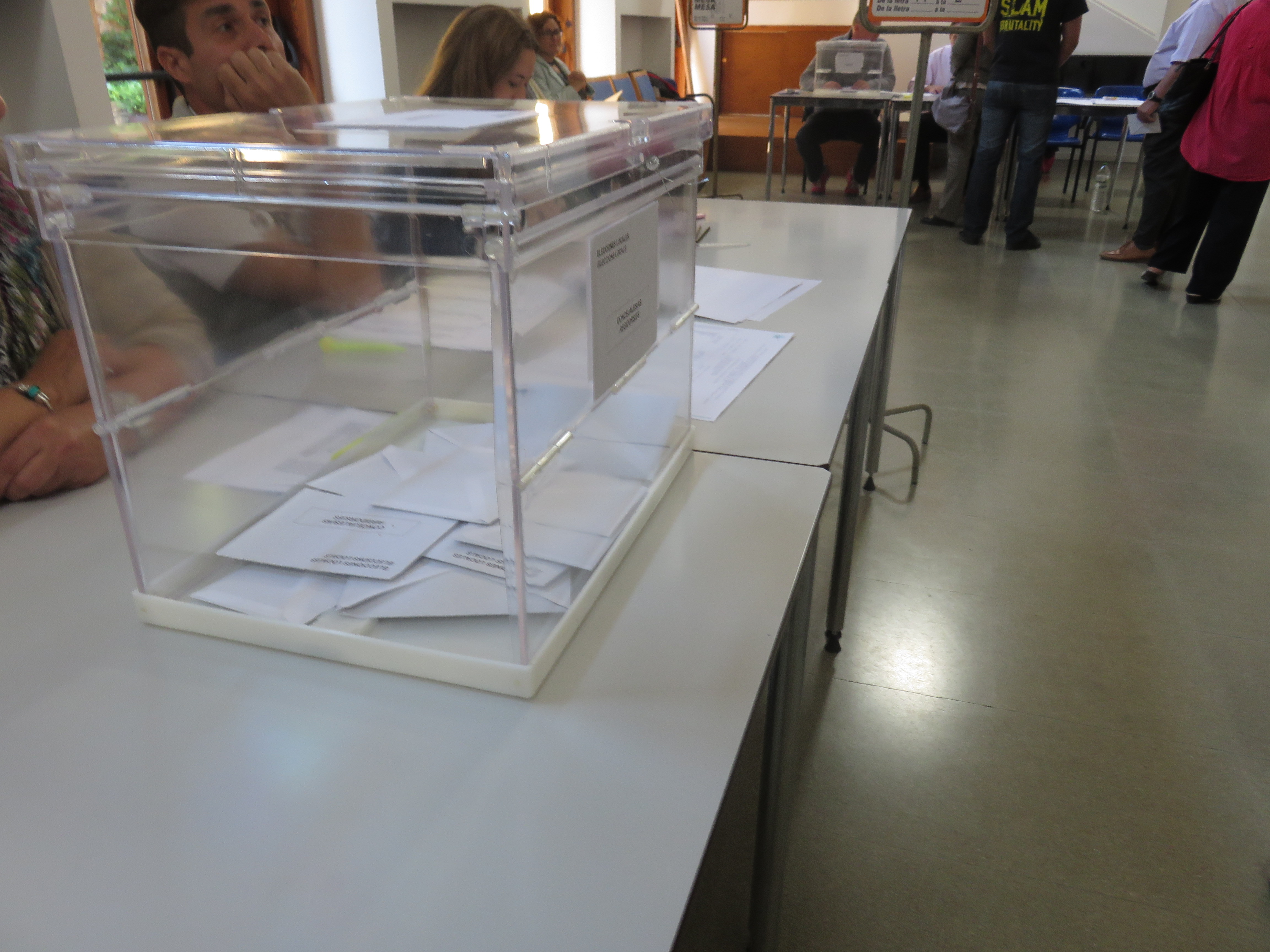 Mesa electoral del Casal de la Gent Gran de Begur